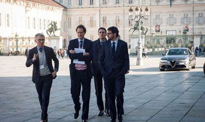 Auro Palomba con John Elkann Alessandro Benetton durante gli anni della presidenza in Benetton Formula